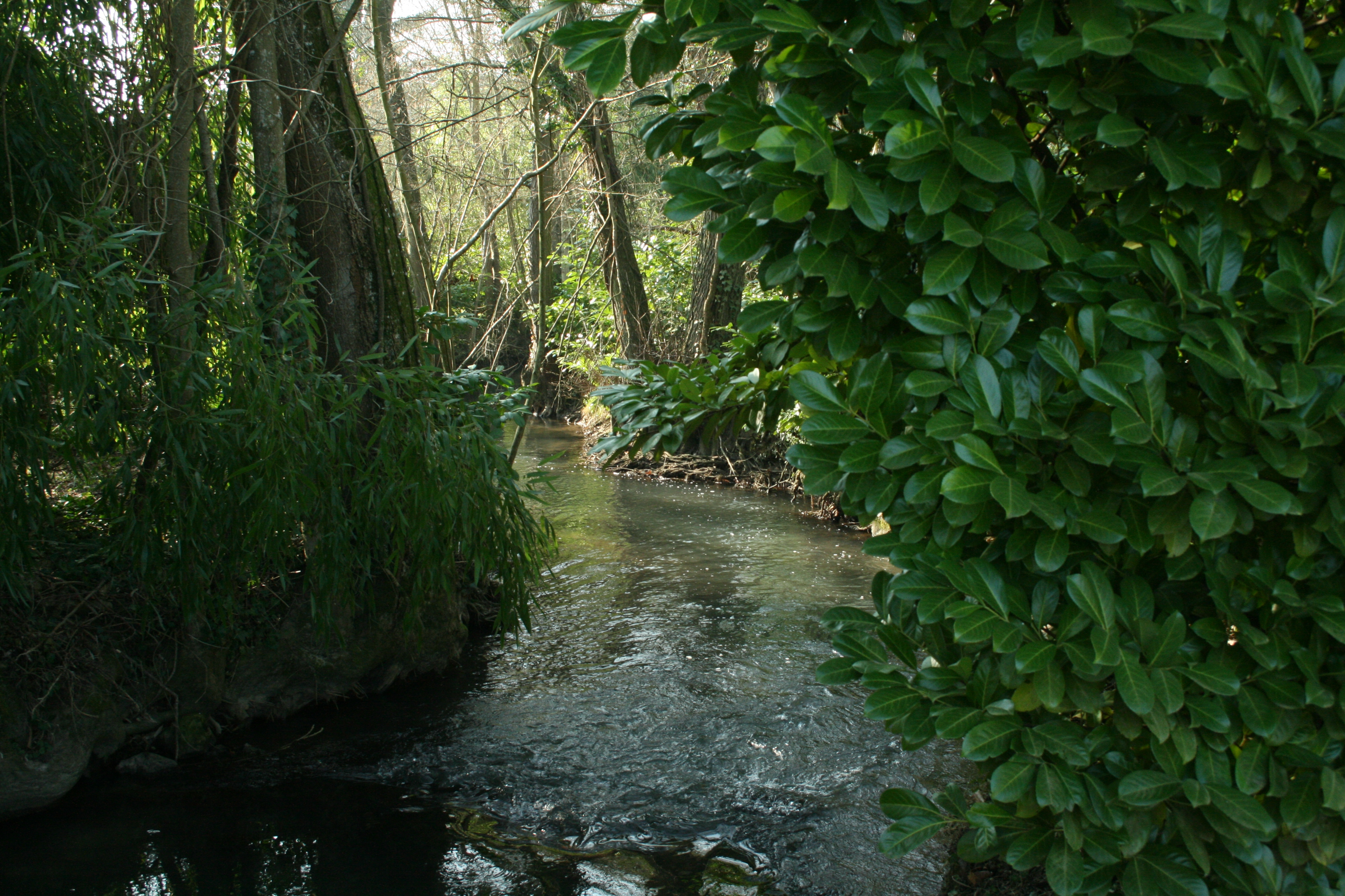 Une vue sur le Lunain, depuis le village de Launoy.